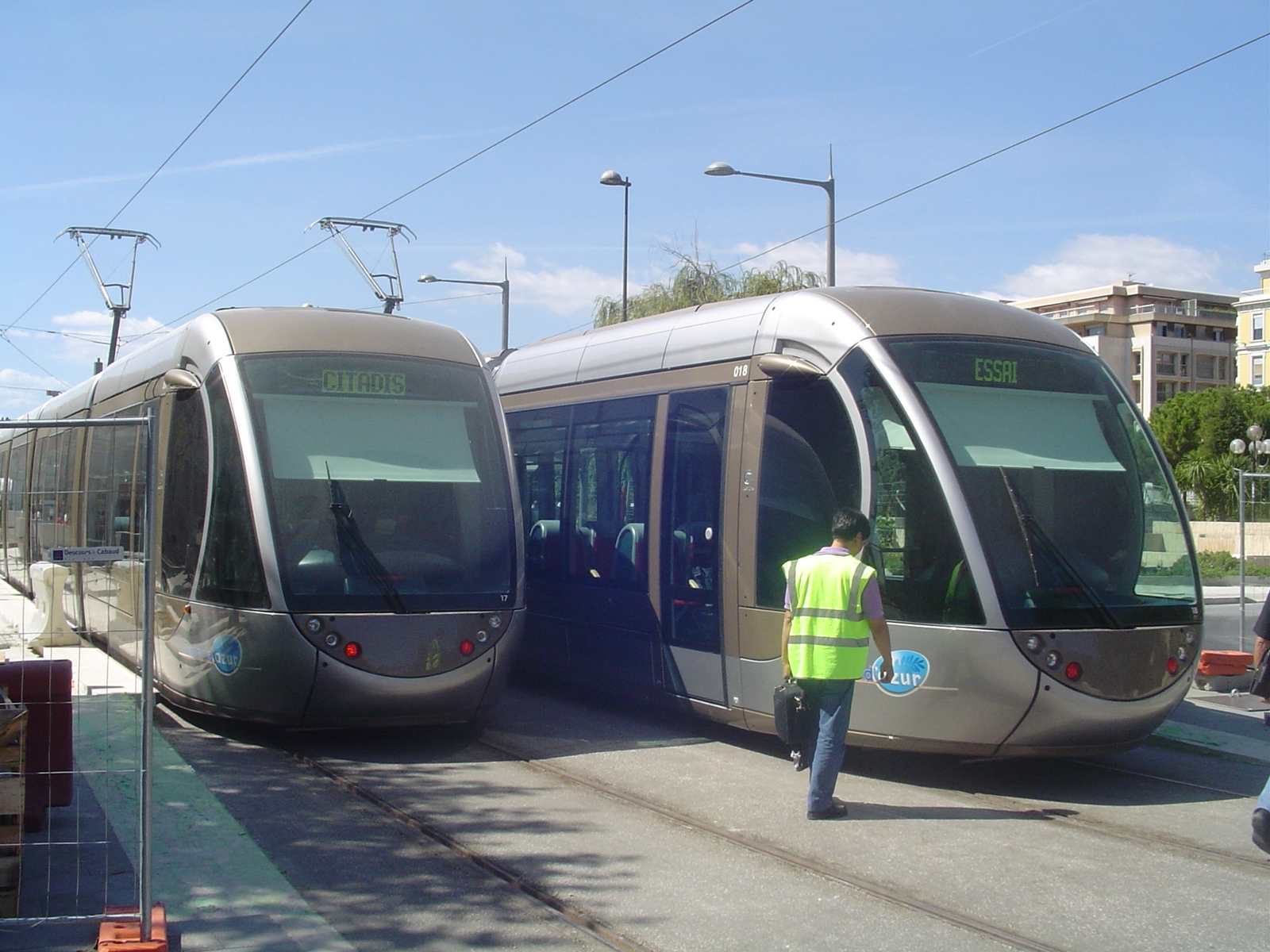 Nouveau tramway de Nice